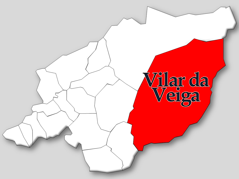 Censos 1864/2011